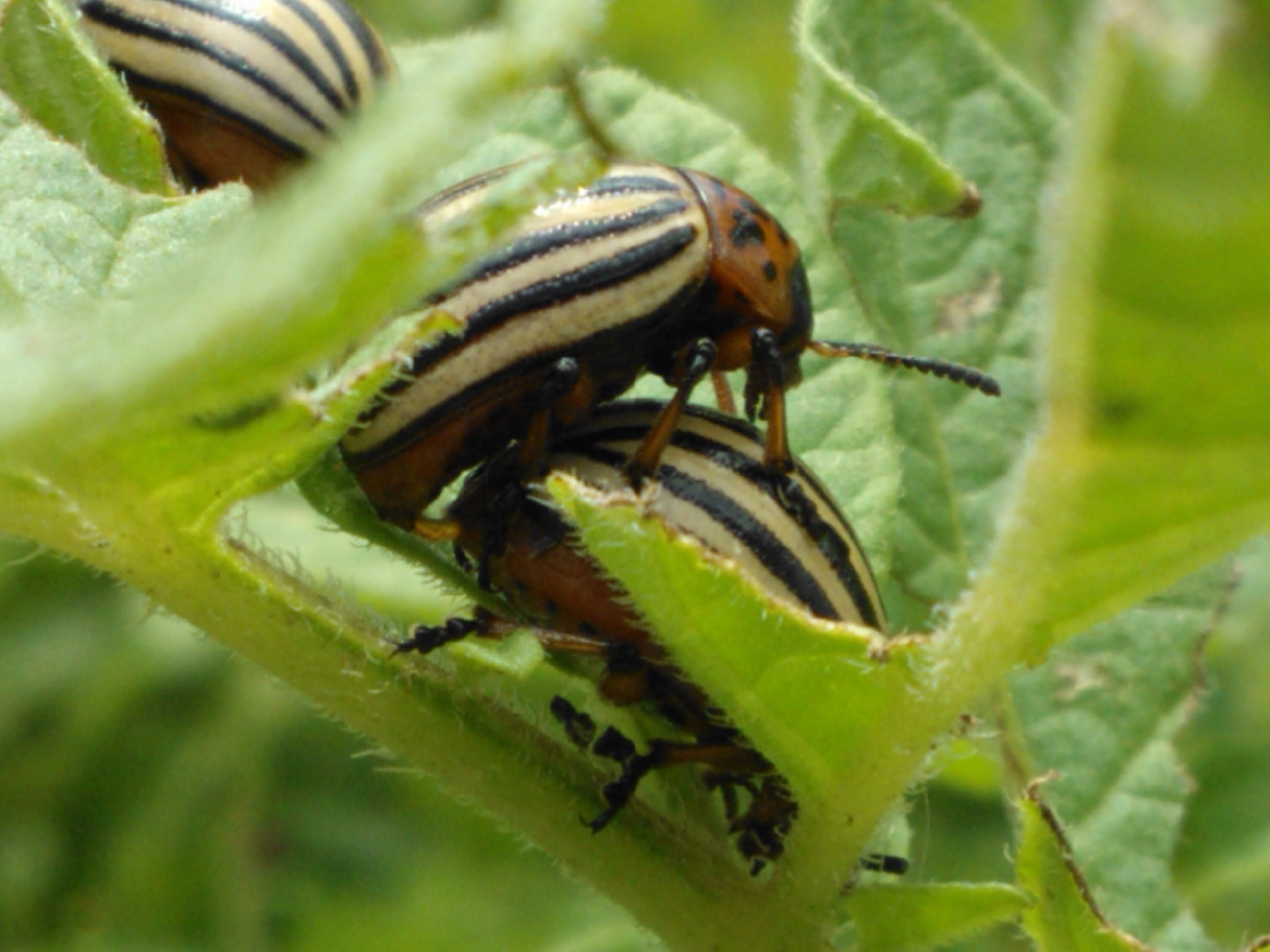 Coitus Leptinotarsa decemlineata